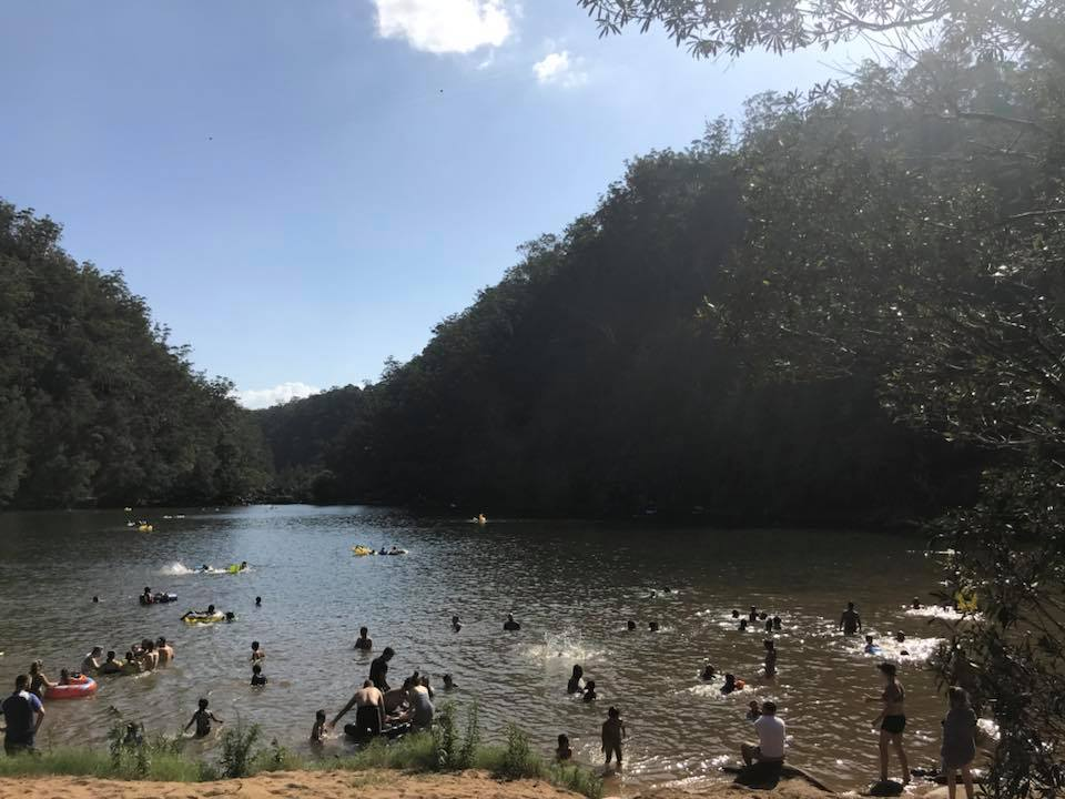 Wide view of swimming hole.